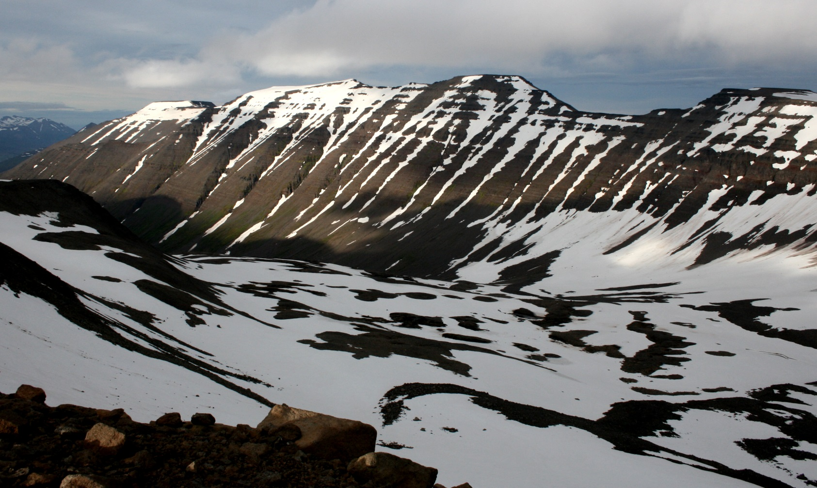 Dýjafjall. Kvarnárdalshnjúkur t.v., Dýjafjallshnjúkur fyrir miðju, Kirkjufjall t.h.